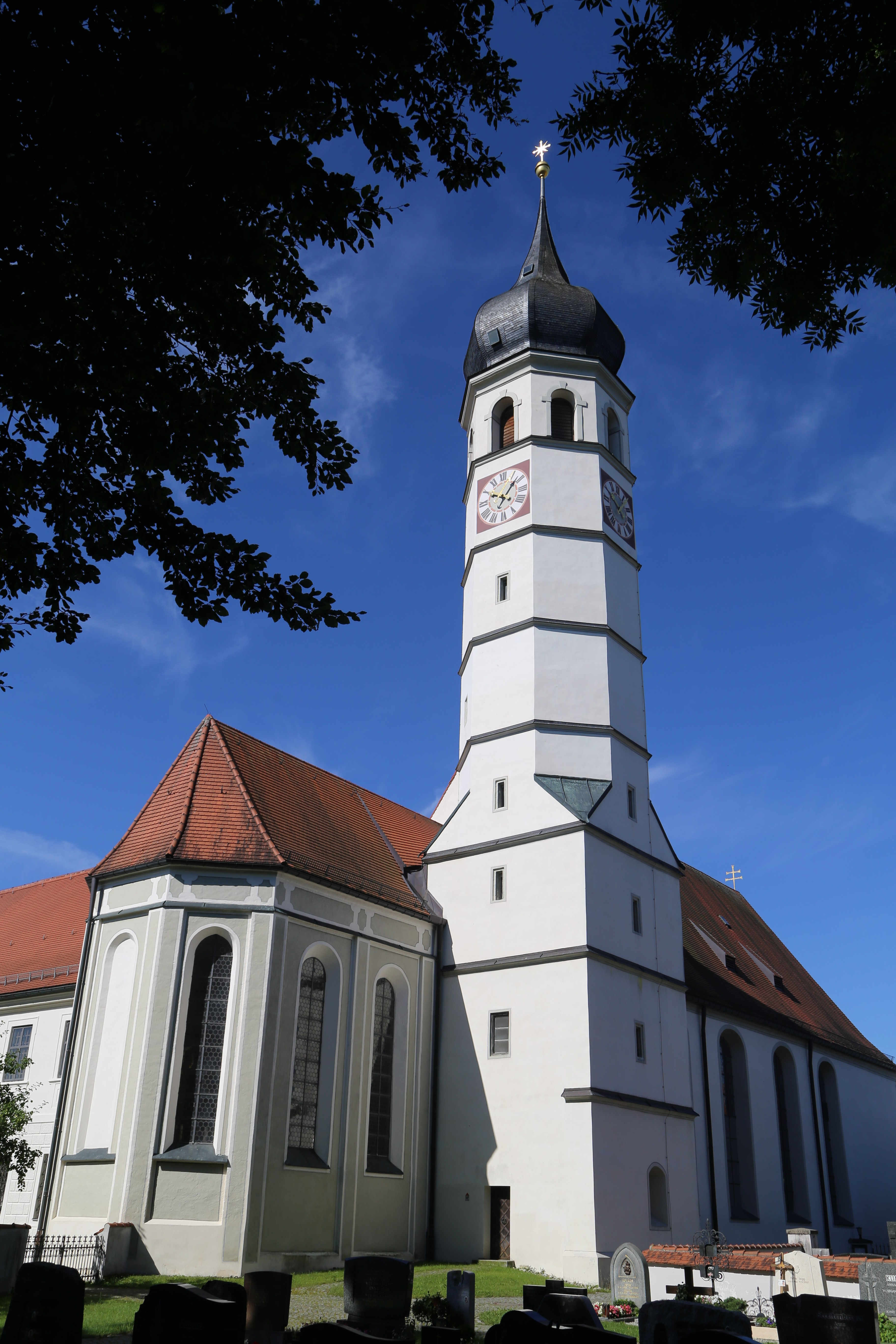 Maxlrainer Straße 11, Beyharting, Tuntenhausen; Ehemalige Augustinerchorherren-Stiftskirche, jetzt Pfarrkirche St. Johann Baptist, Saalbau mit Vorhalle, eingezogenem Langchor und Nordturm, Weihe des ersten Baues 1130, Chorneubau, Kreuzgang und Turm 1420/60, Langhausumbau zu einem einschiffigen Saalbau durch Constantin Pader 1668/70, 1730 barocke Ausgestaltung des Inneren; mit Ausstattung.